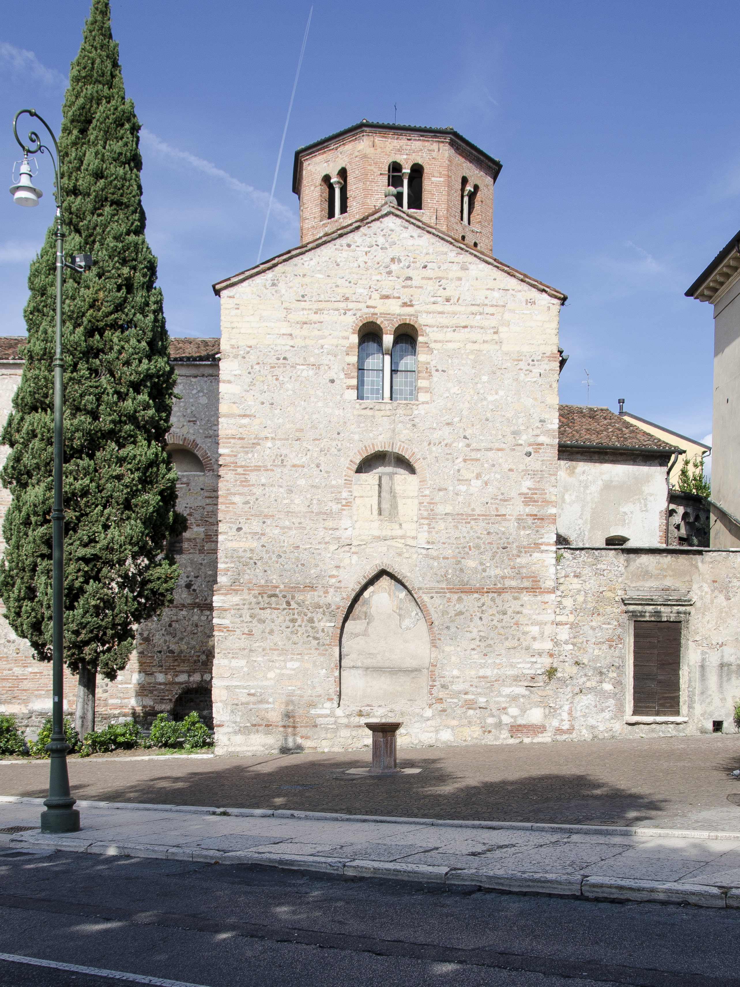 Fotografia dell'esterno